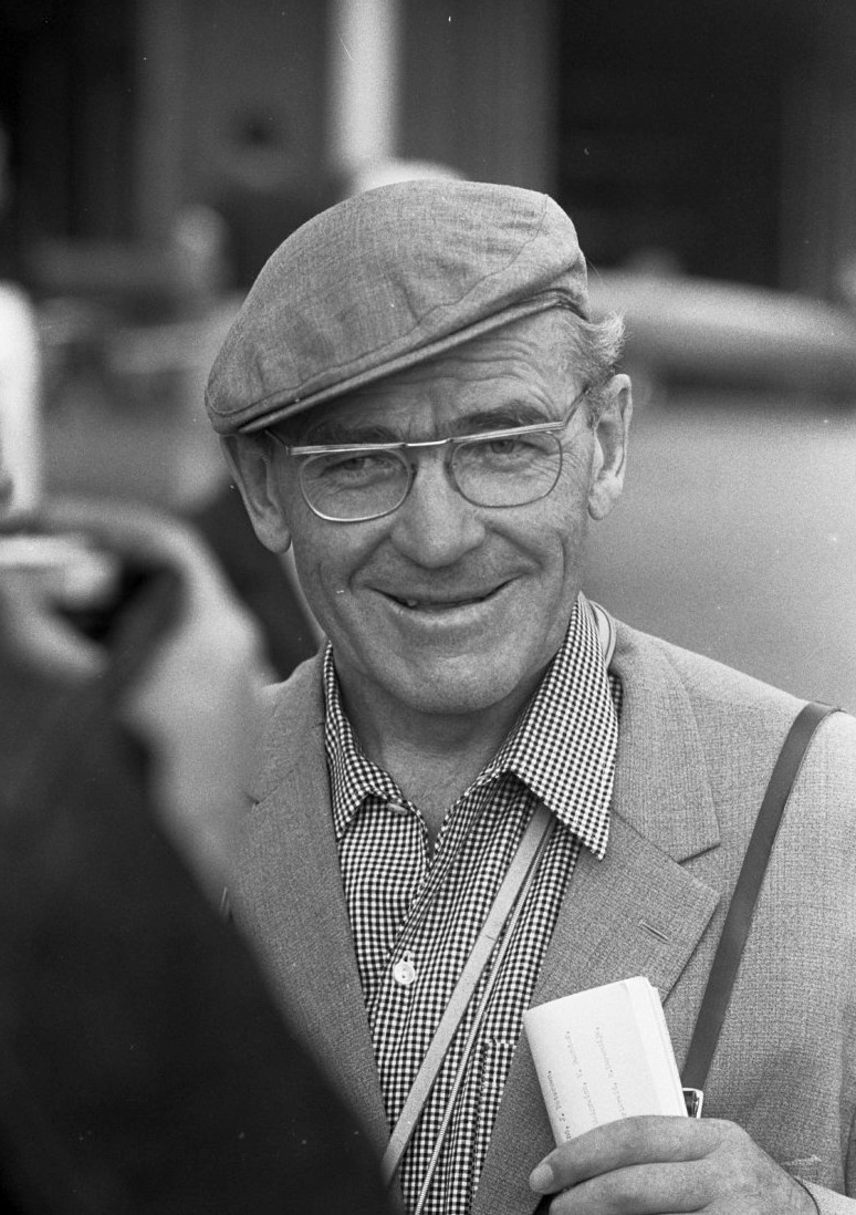 Roeien Bosbaan. Karl Adam , trainer Ratzburger acht Duitsland